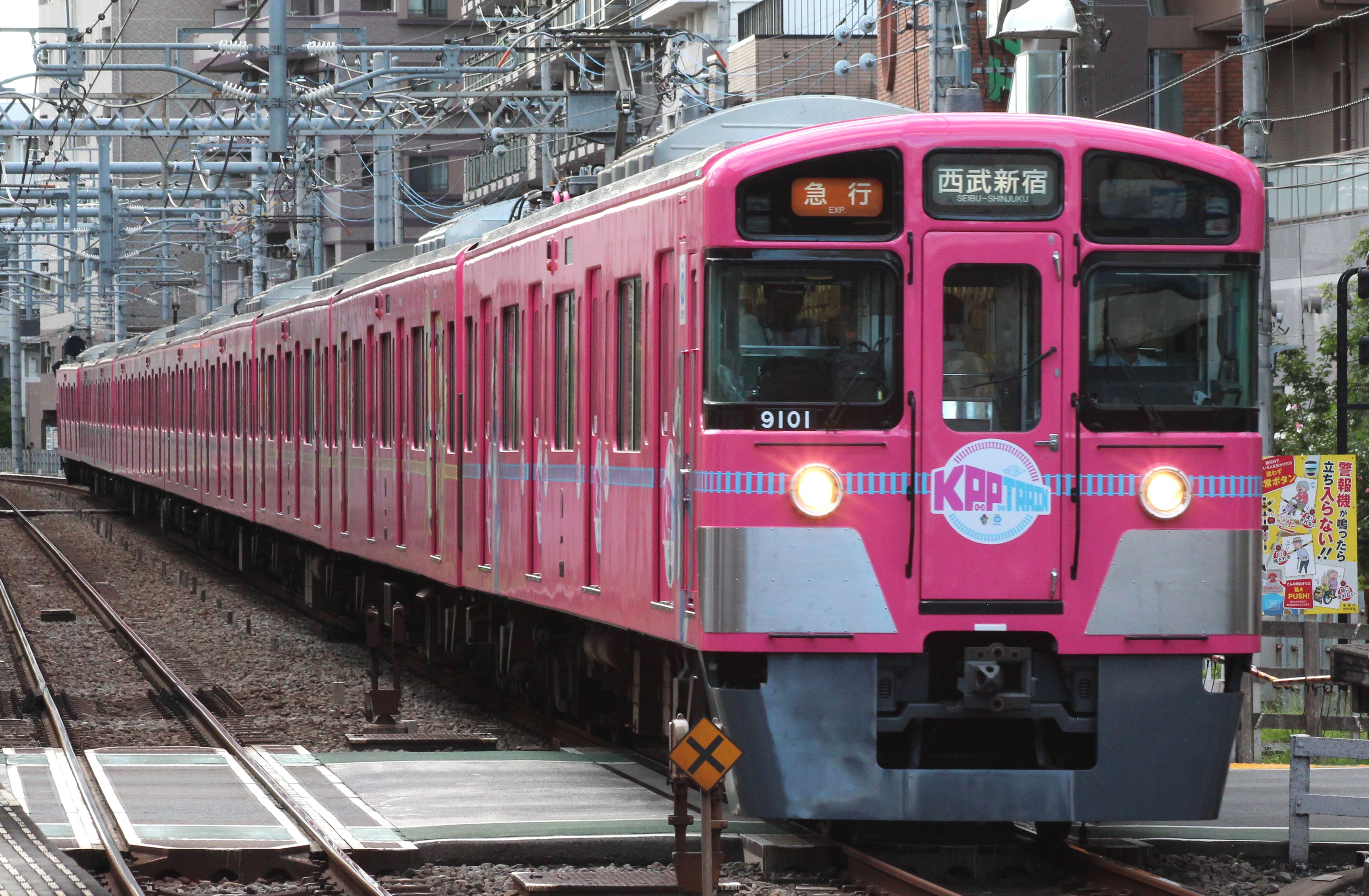 西武9000系電車9101編成「SEIBU KPP TRAIN」